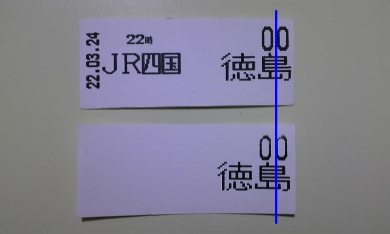 JR四国の車両内で発券される「整理券」。 上の画像が表側。 下の画像が裏側。 表側の左に印字されているのが、下から順に年、月、日である。 「JR四国」の上に印字されているのは、発行した時間である。 右上の数字は駅番号（徳島駅はT00）。その下に印字されているのは発行した駅名。